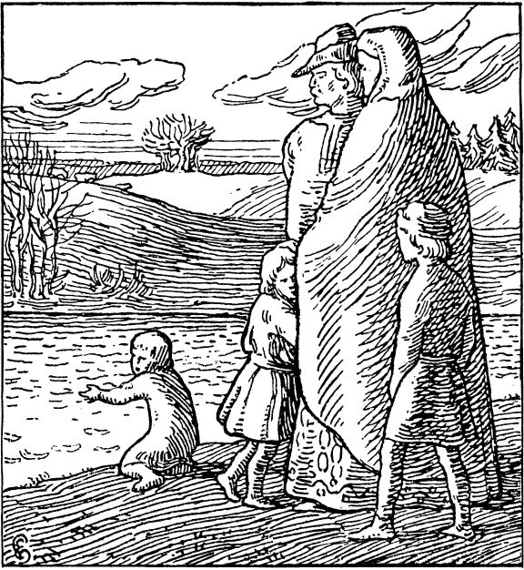 Halfdan Egedius: Illustration for Olav den helliges saga. Snorre 1899-edition. «Kong Olav med sine Halvbrødre.» nb: «Kong Olav med halvbrødrene sine.» nn: «Kong Olav med halvbrørne sine.»